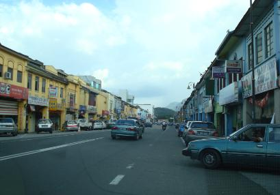 Bentong, Malaysia